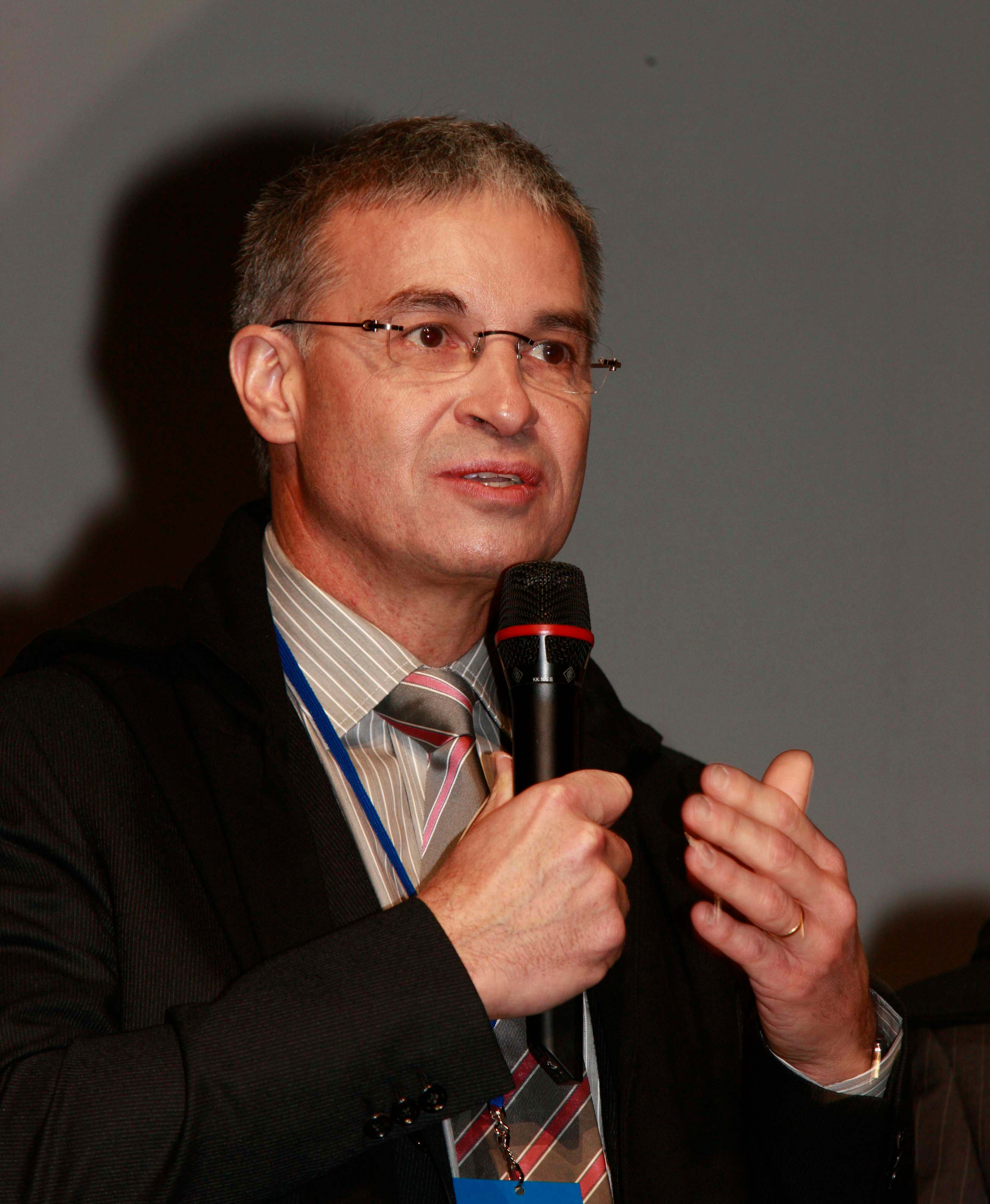 Patrick Bernasconi, chef d'entreprise français